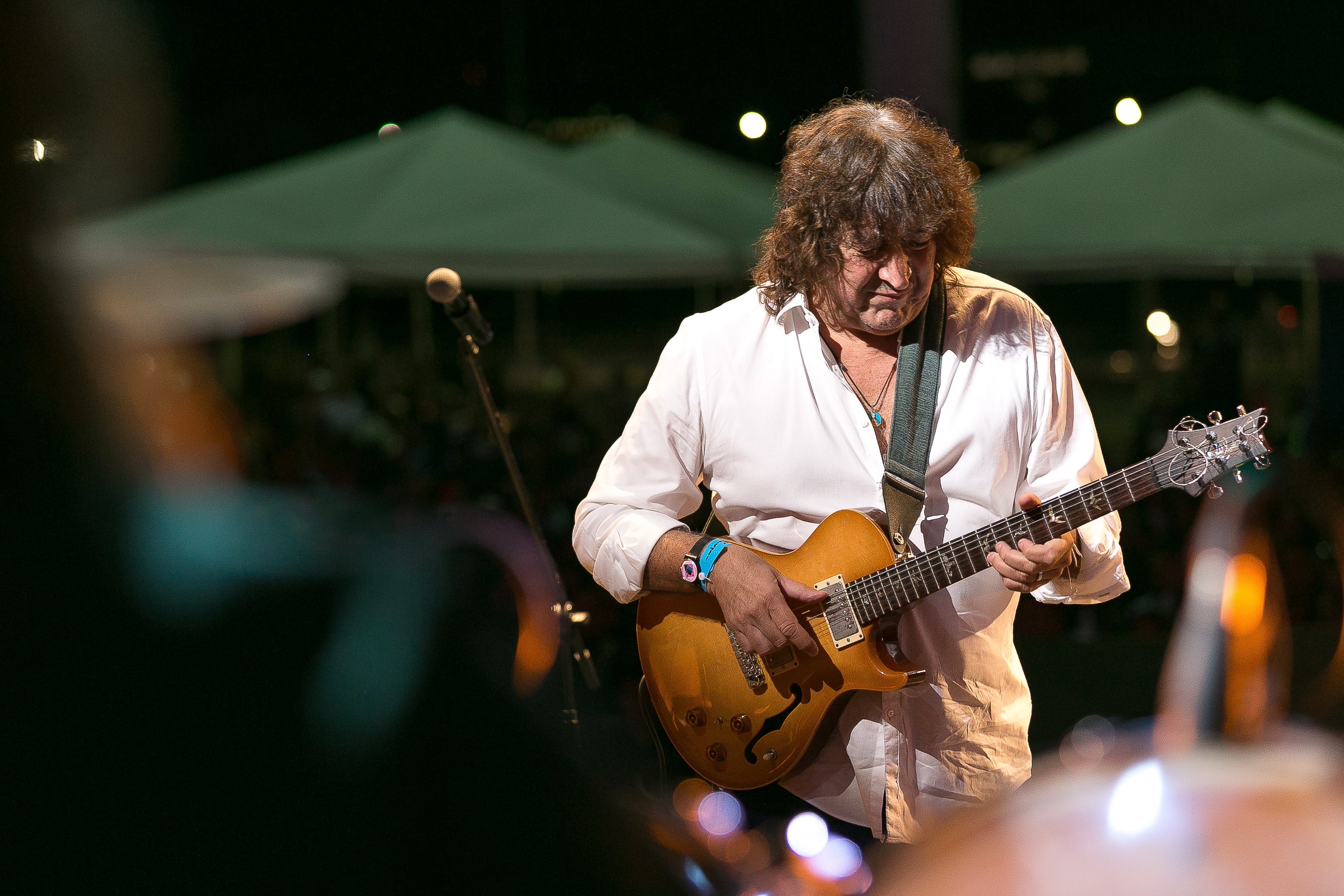 Músico Toninho Horta